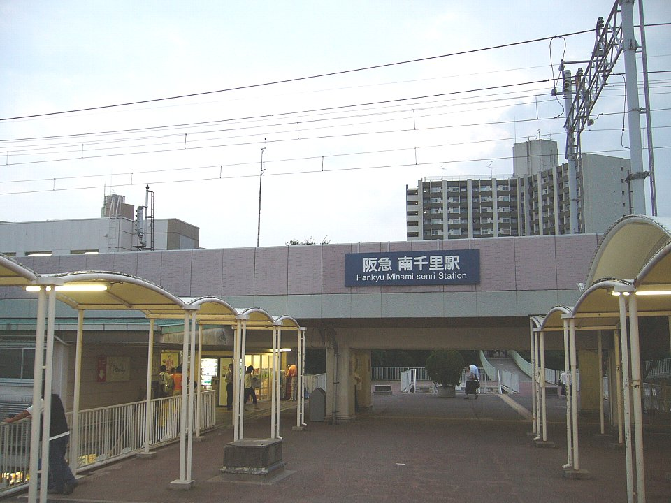 南千里駅 駅の北側を東西に抜ける高架歩道が、駅とニュータウンを直接結ぶ。右奥の通路は竹見台に通じる